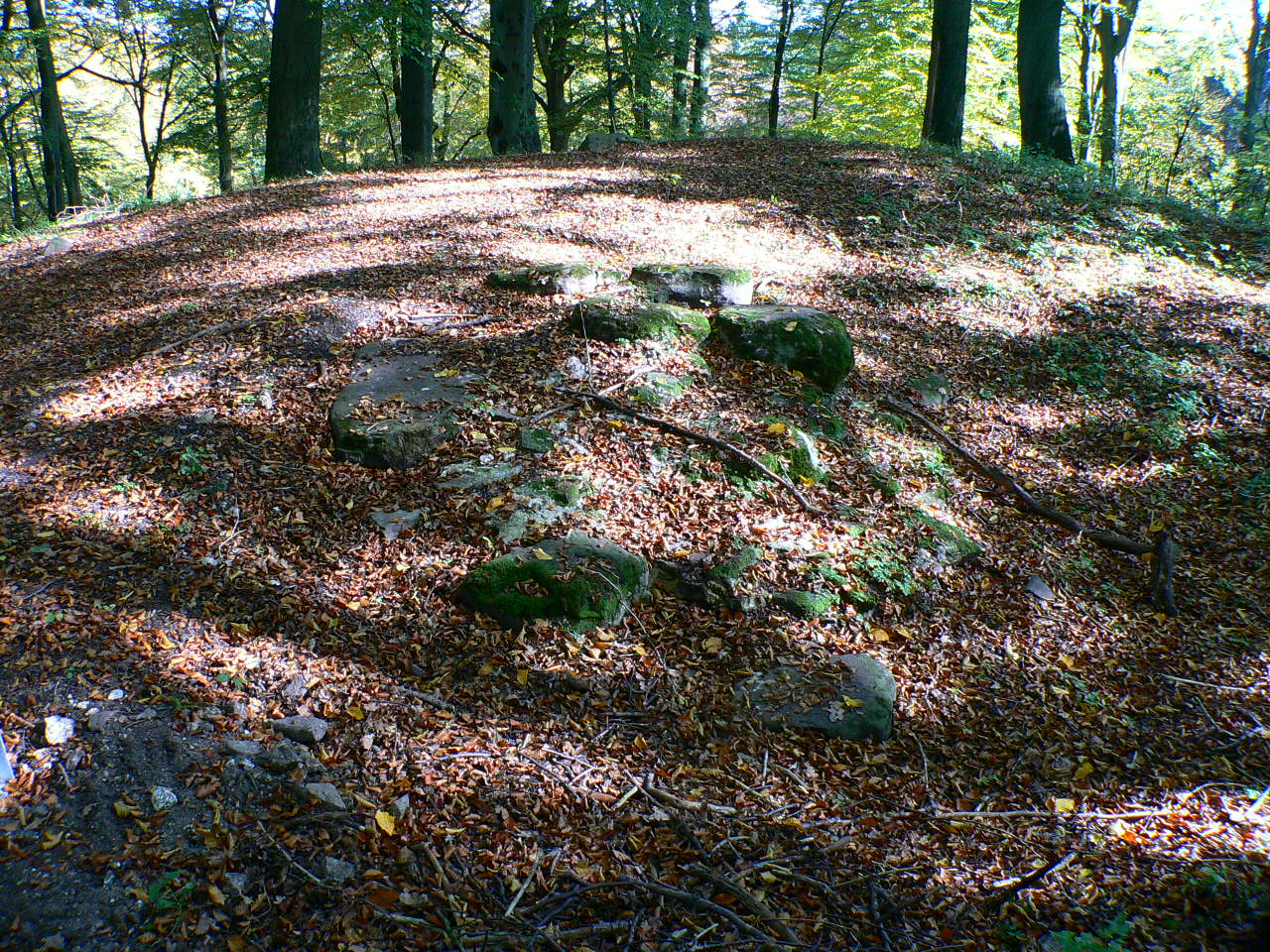 Turmrest auf dem Ahlberg im Reinhardswald